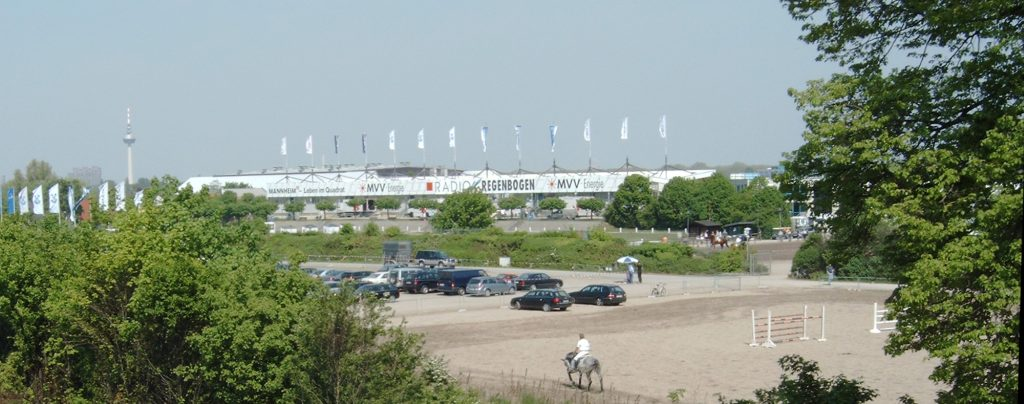 Maimarkt in Mannheim.